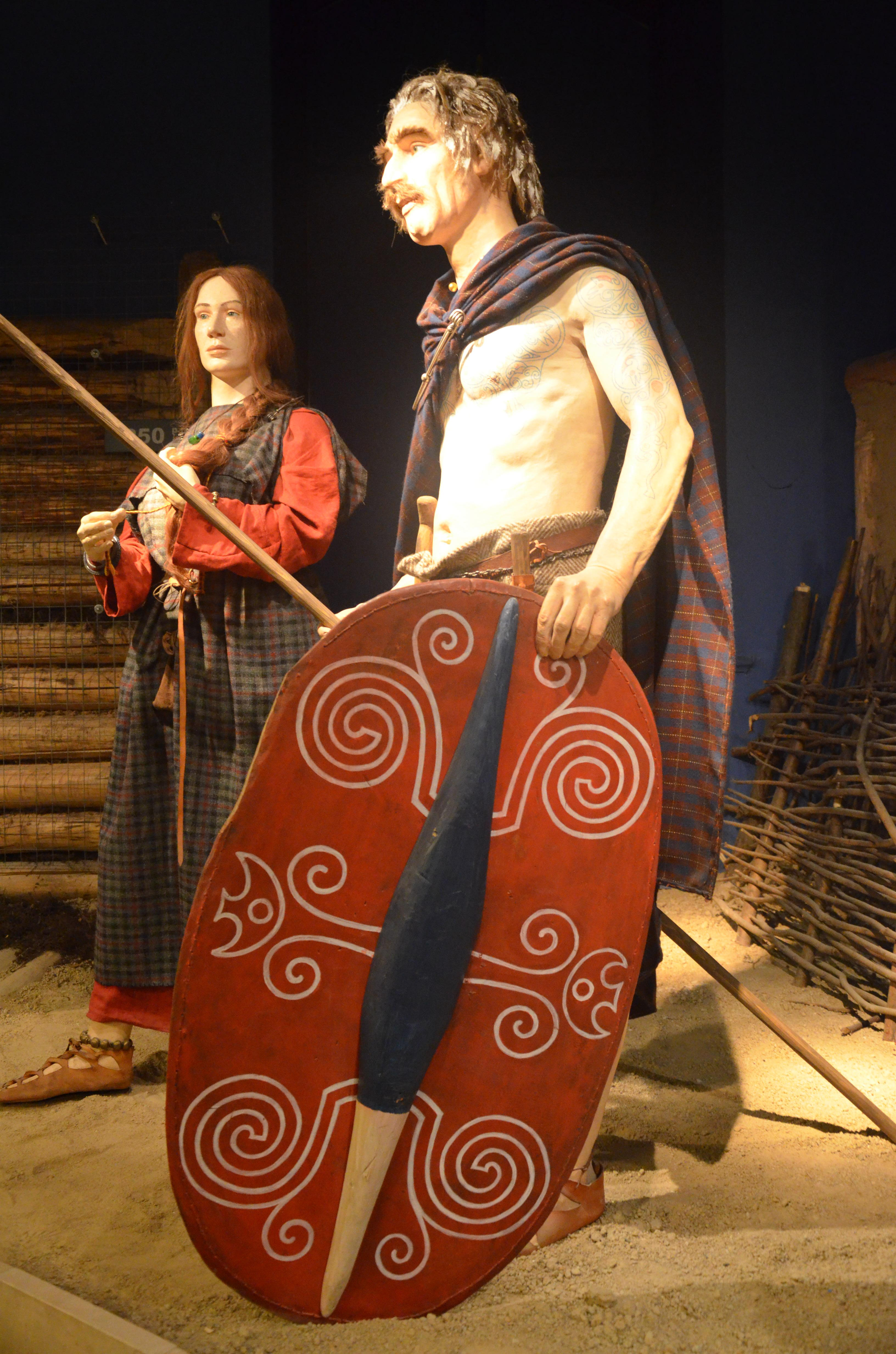 Kleidung der Kelten in Südpolen im 3.Jh. v. Chr.